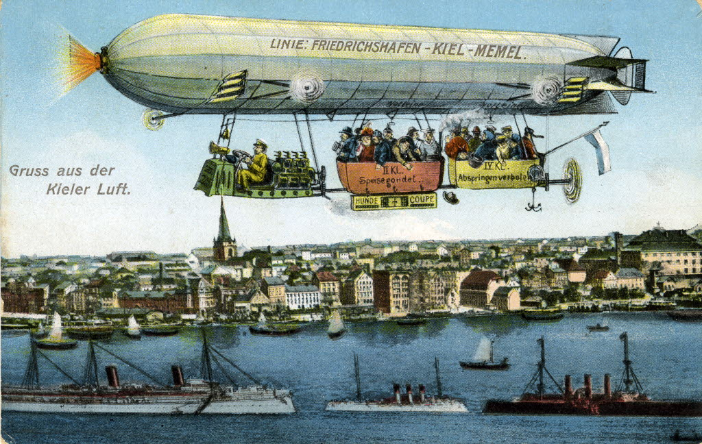 Luftschiff der Linie Friedrichshafen - Kiel - Memel.